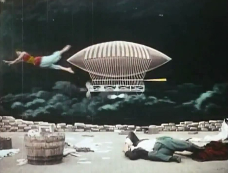 Photo du film "Le Dirigeable fantastique" (Méliès, 1906)